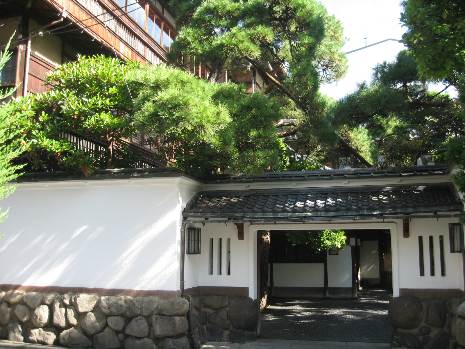 新潟市中央区。鍋茶屋正面の画像。